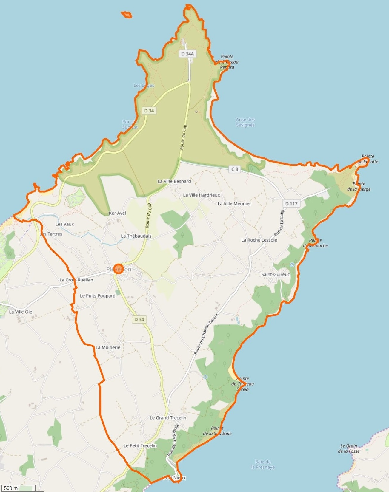 Cette carte a été créée à partir des données du projet Openstreetmap. This map may be incomplete, and may contain errors. Don't rely solely on it for navigation.